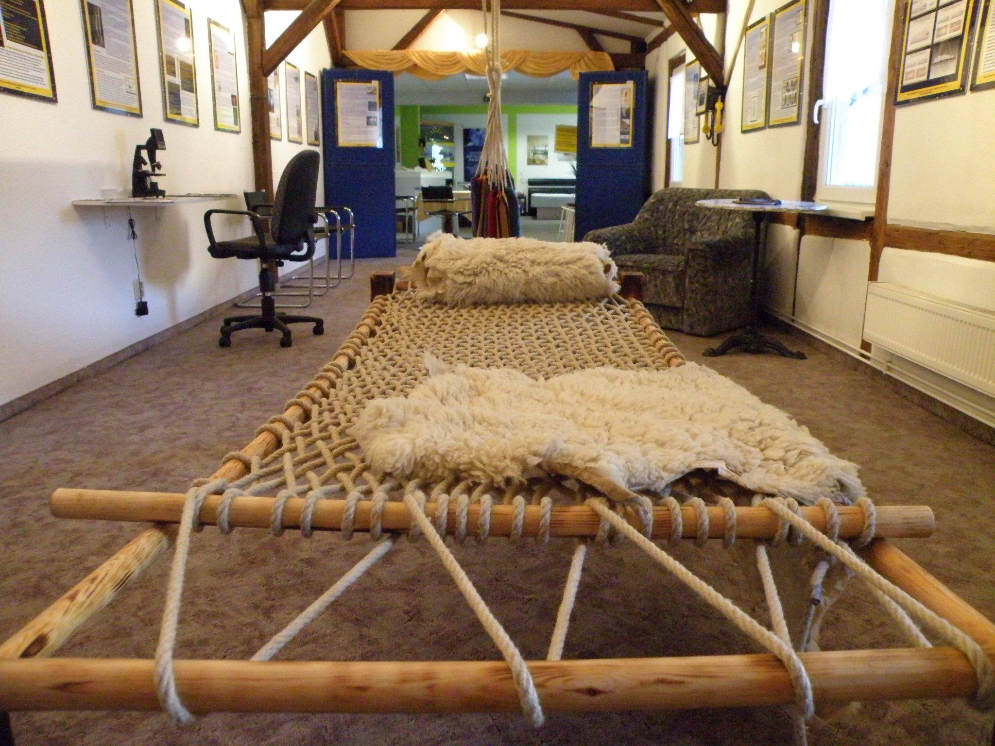 Von historischen Darstellungen nachempfundenes Charpaibett aus Indien im Betten- und Schlafmuseum Freiberg